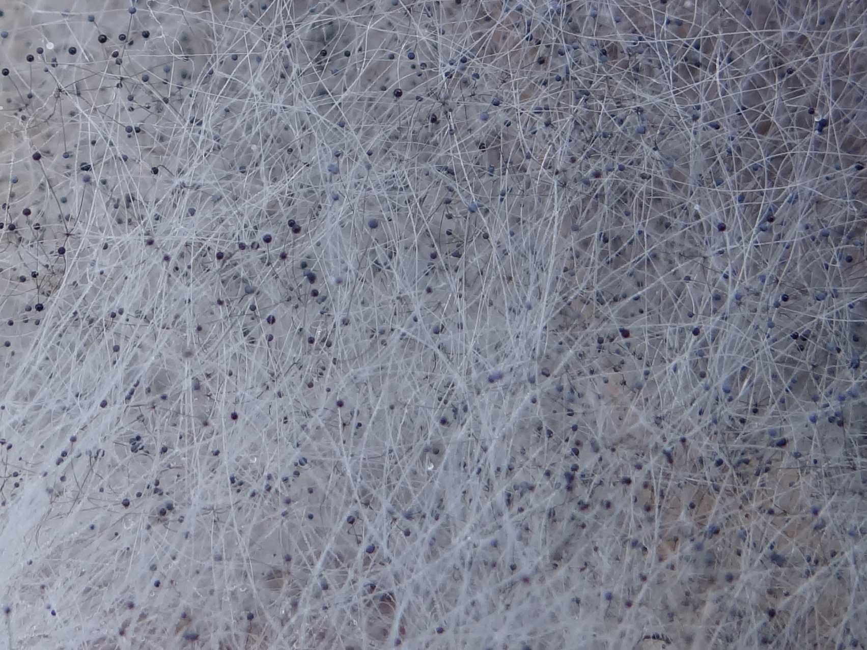 Mucor mucedo